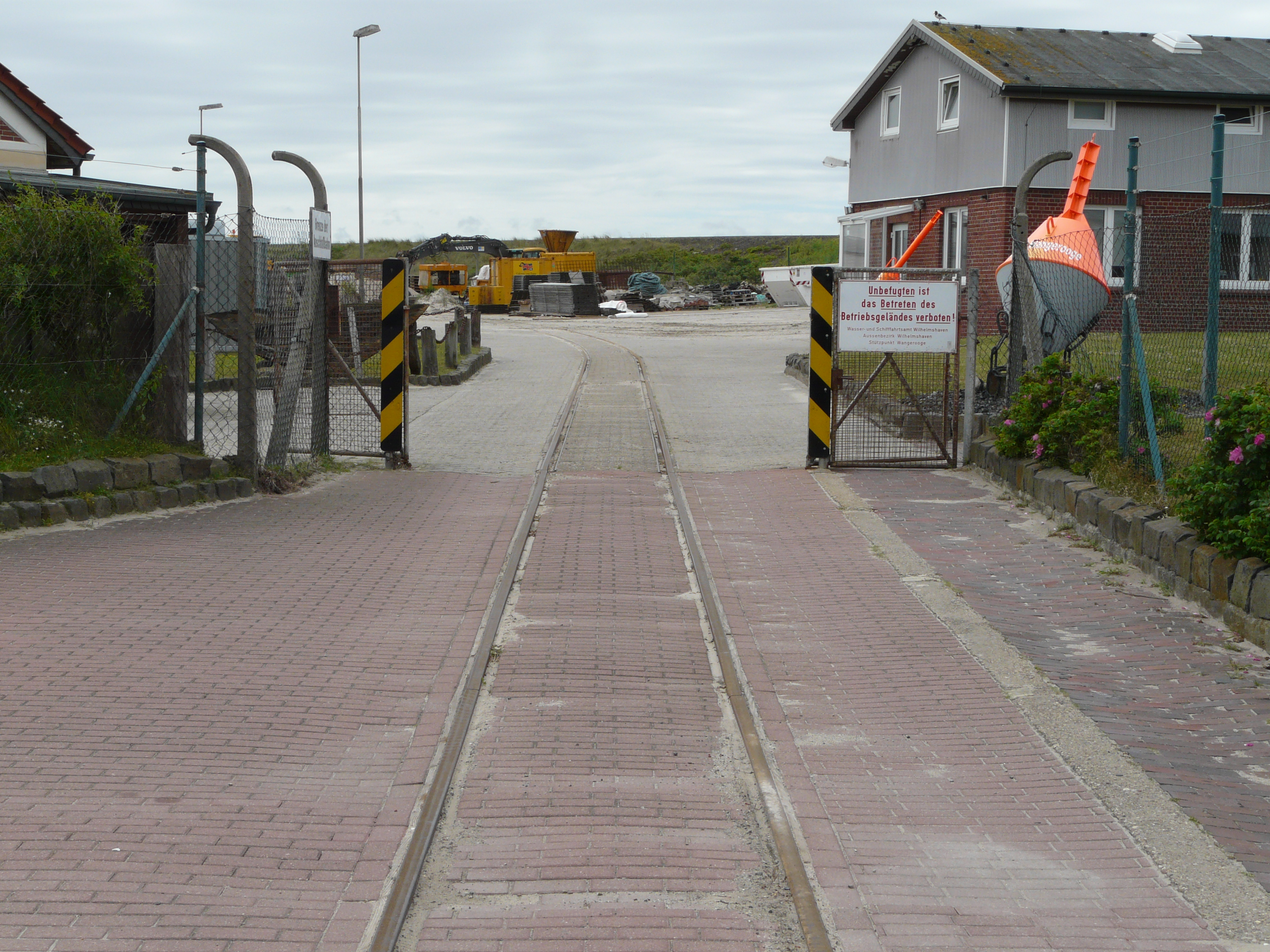 Inselbahn Wangerooge: Gleisanschluss des Bauhofes vom das Wasser- und Schifffahrtsamt